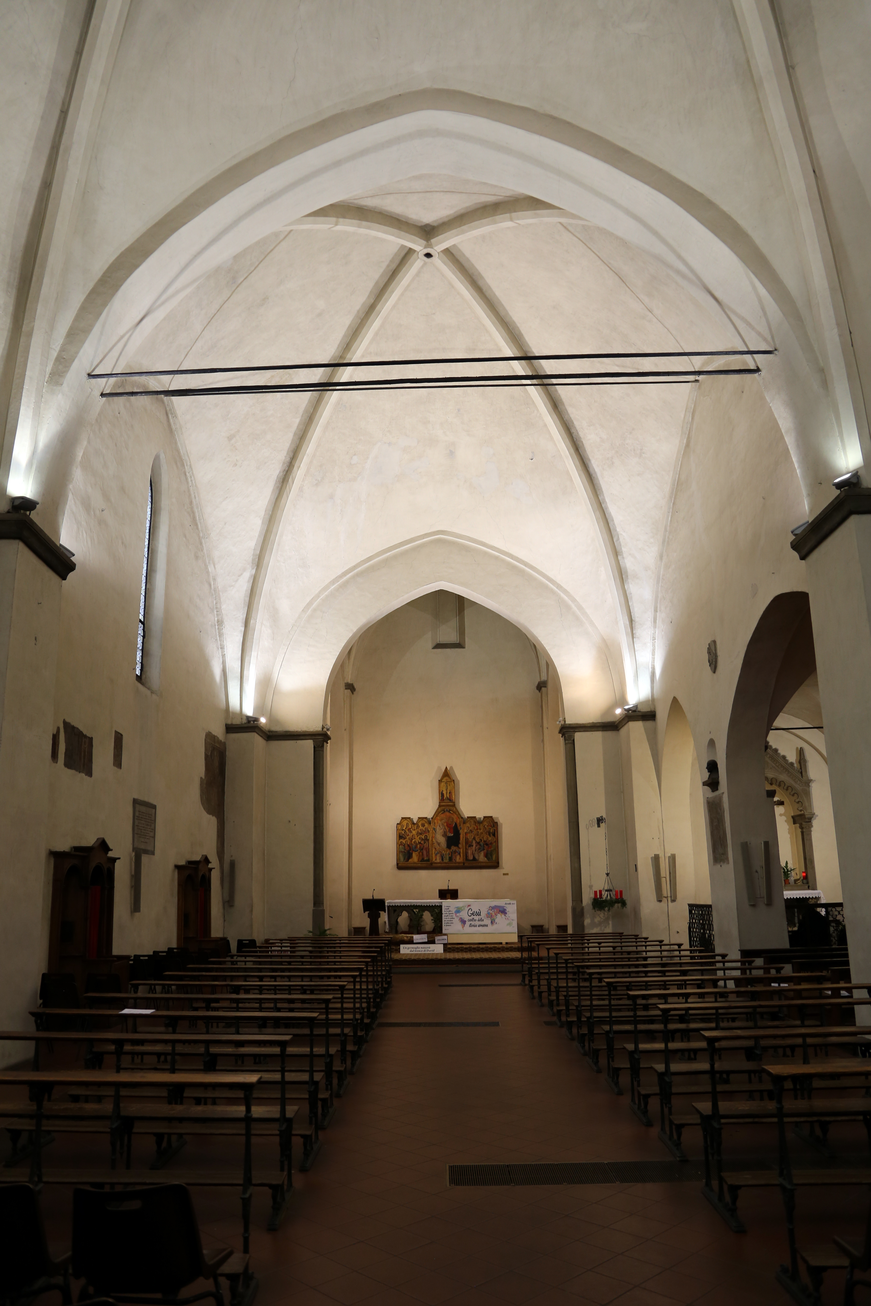 Centro Storico di San Giovanni Valdarno This is a photo of a monument which is part of cultural heritage of Italy.